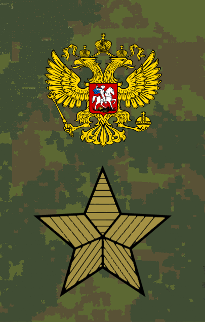 полевой погон Маршала Российской Федерации